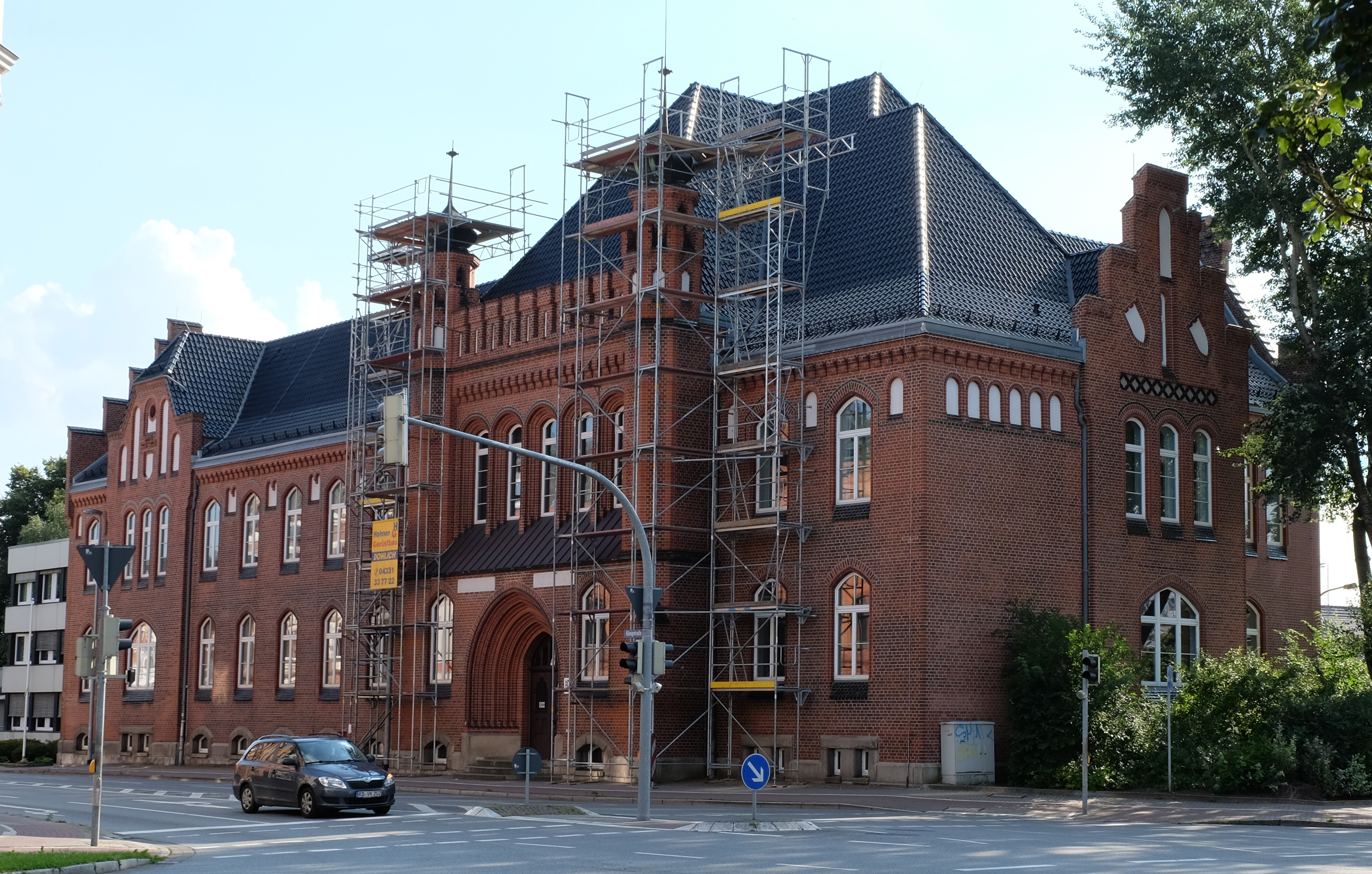 Königstraße 17, Amtsgericht Rendsburg, Altbau